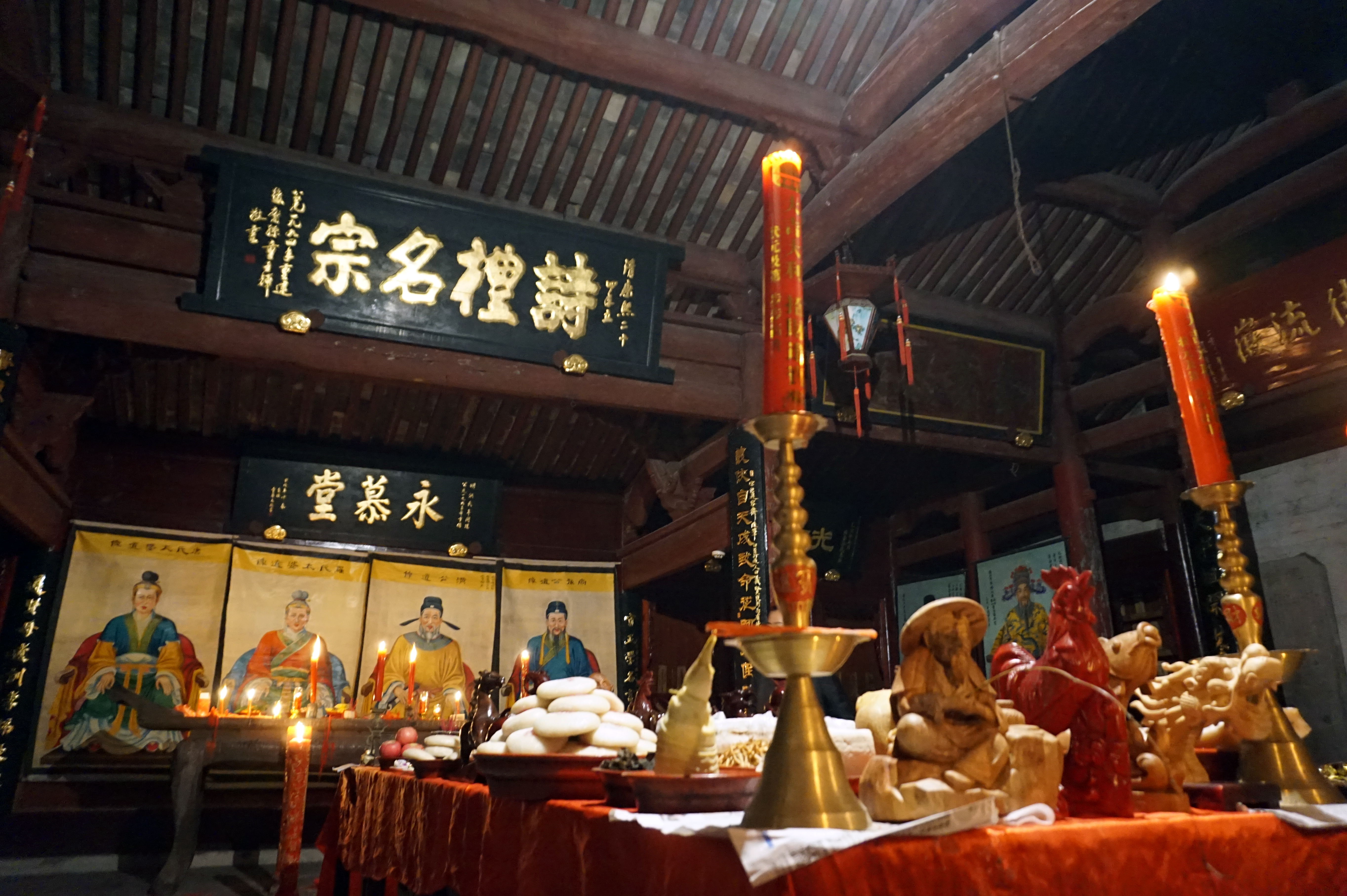 童氏宗祠，元宵供品。